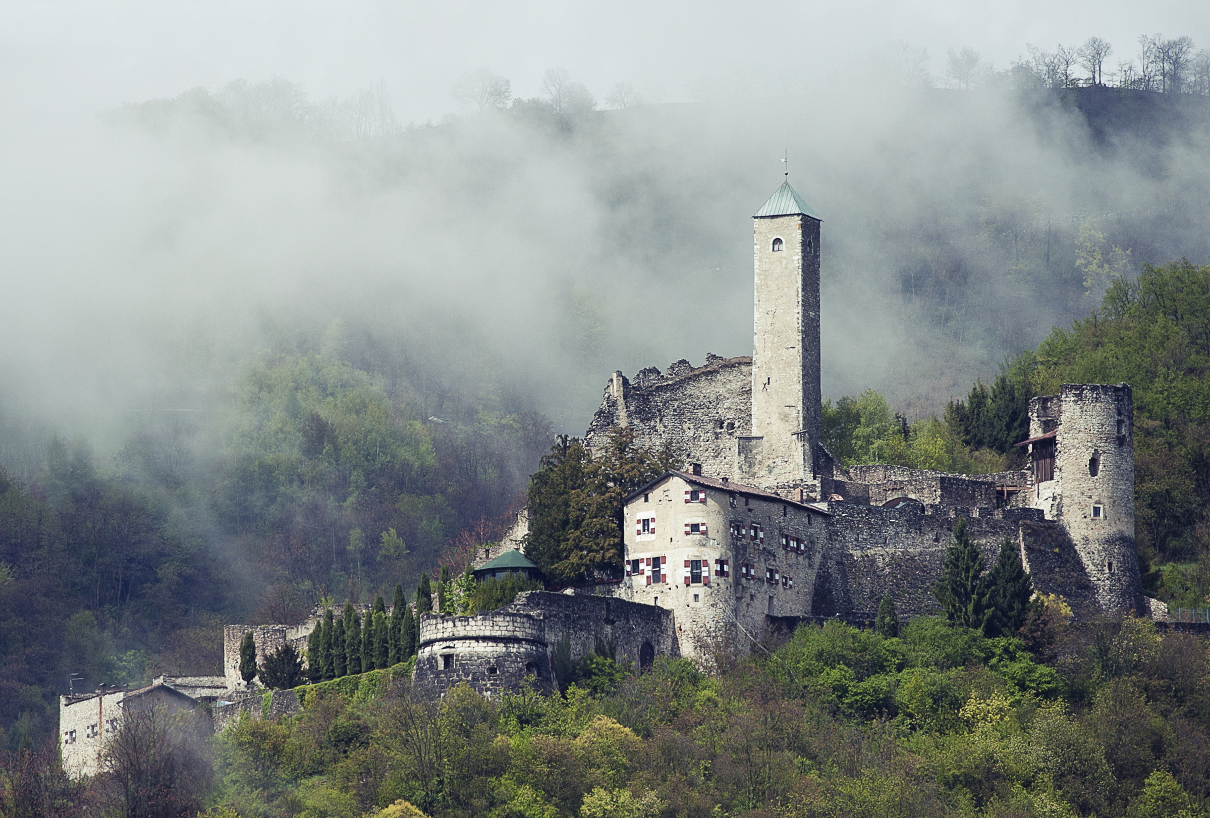 Castel Telvana, Borgo Valsugana, Italy